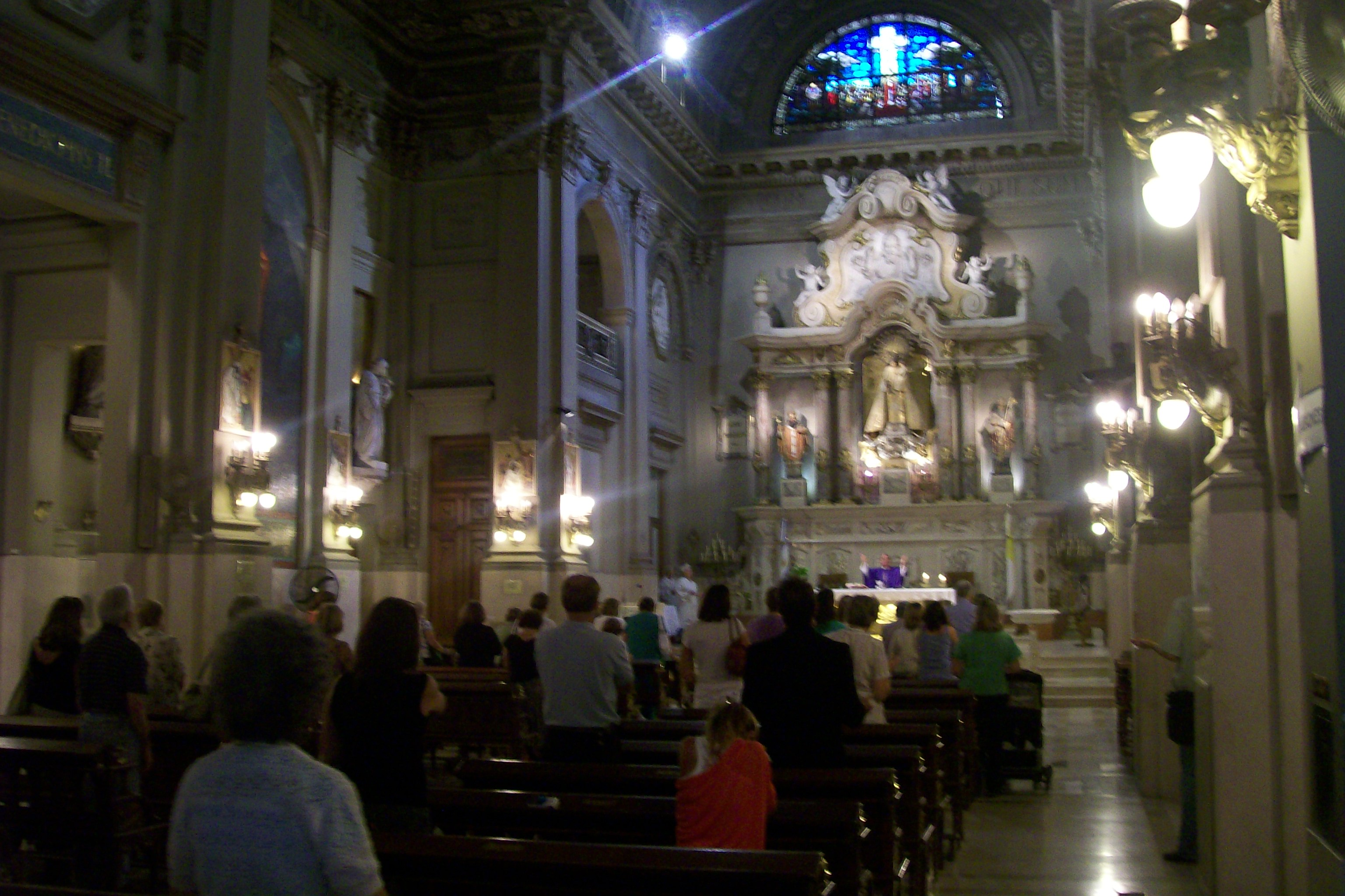 Iglesia de San Nicolás, Buenos Aires